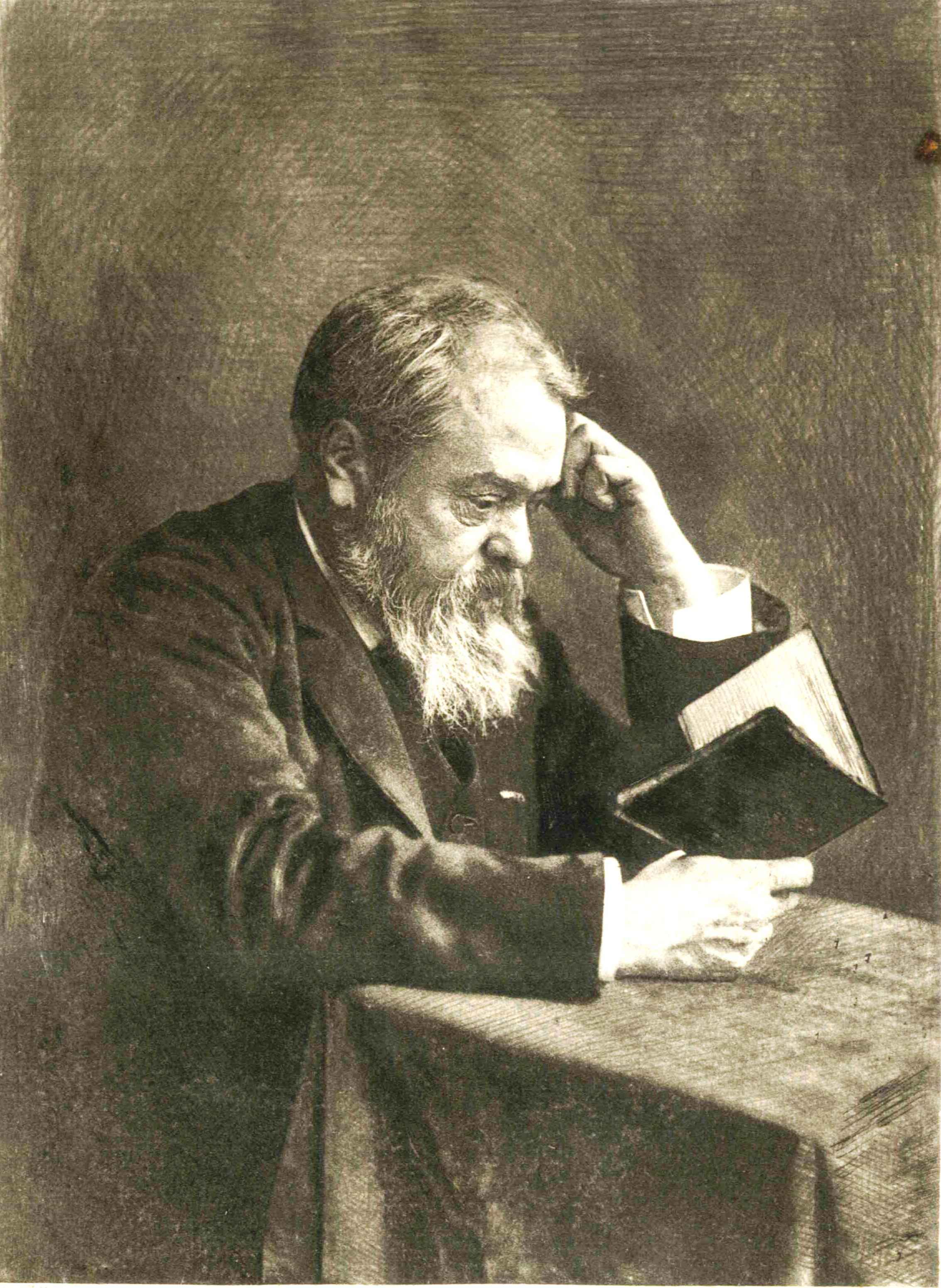 photogravure de Félix Thiollier vers 1900